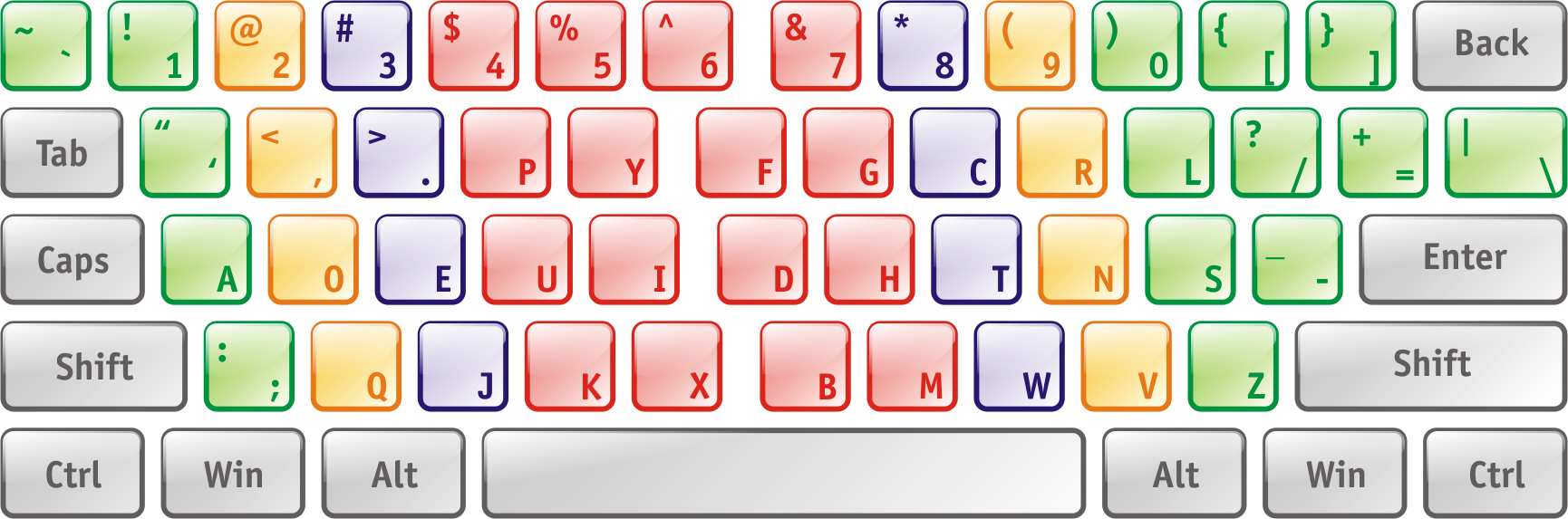 Dvorak Layout